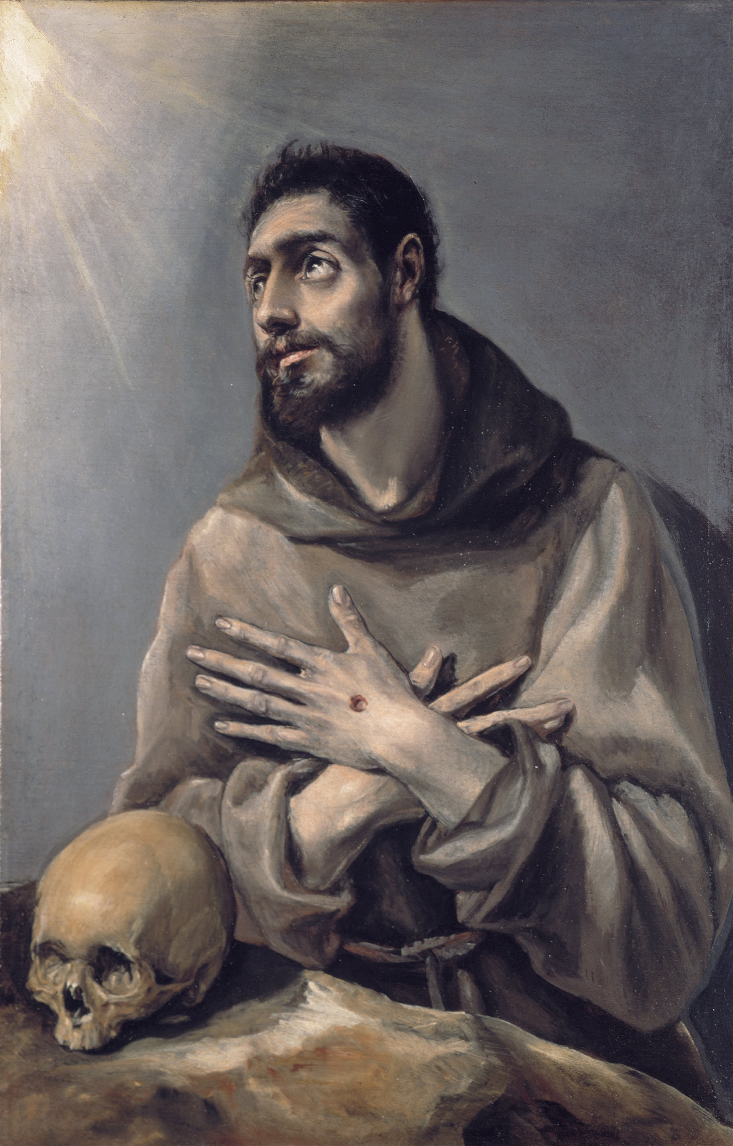 La obra representa a Francisco de Asís, fundador de la Orden de los franciscanos, en actitud extática.